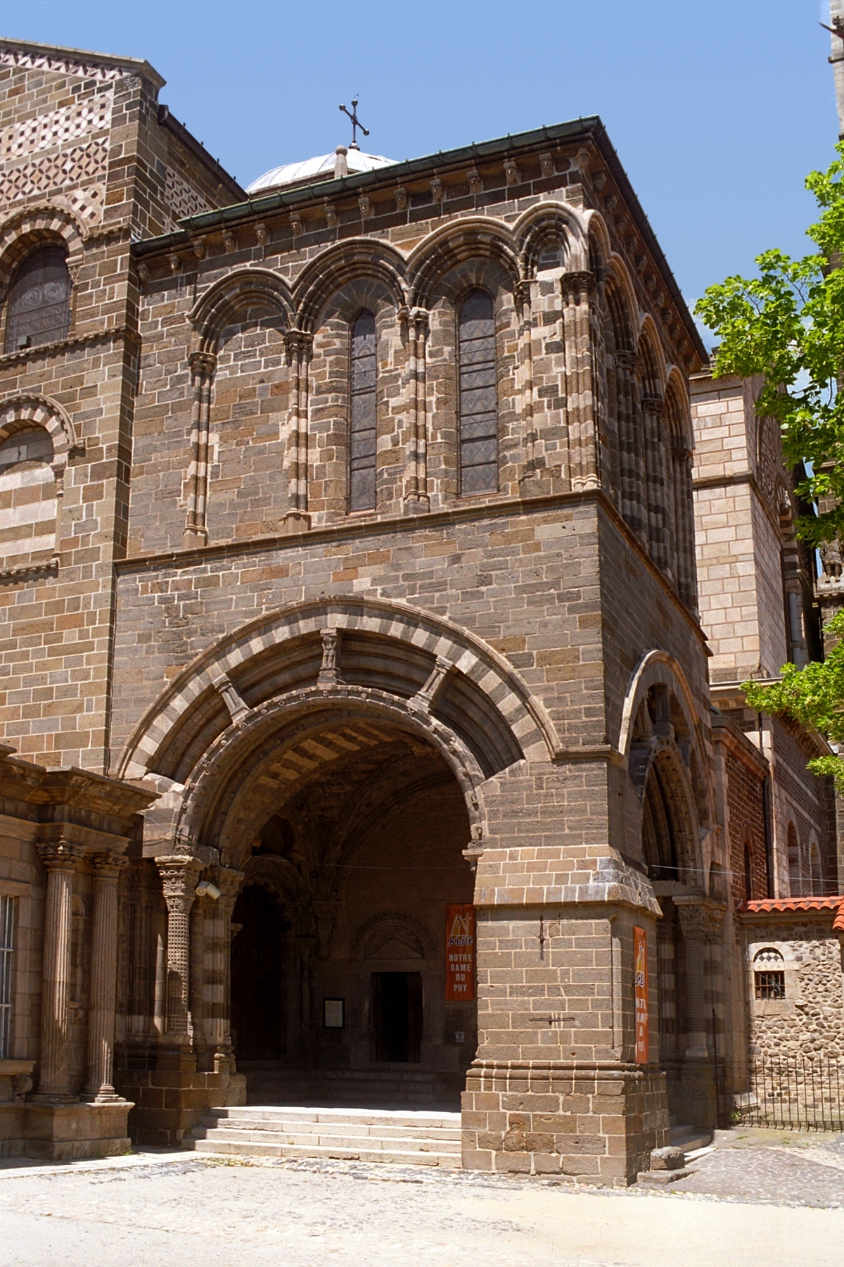 France - Velay - Cathédrale Notre-Dame-de-l'Annonciation du Puy-en-Velay - Porche du For